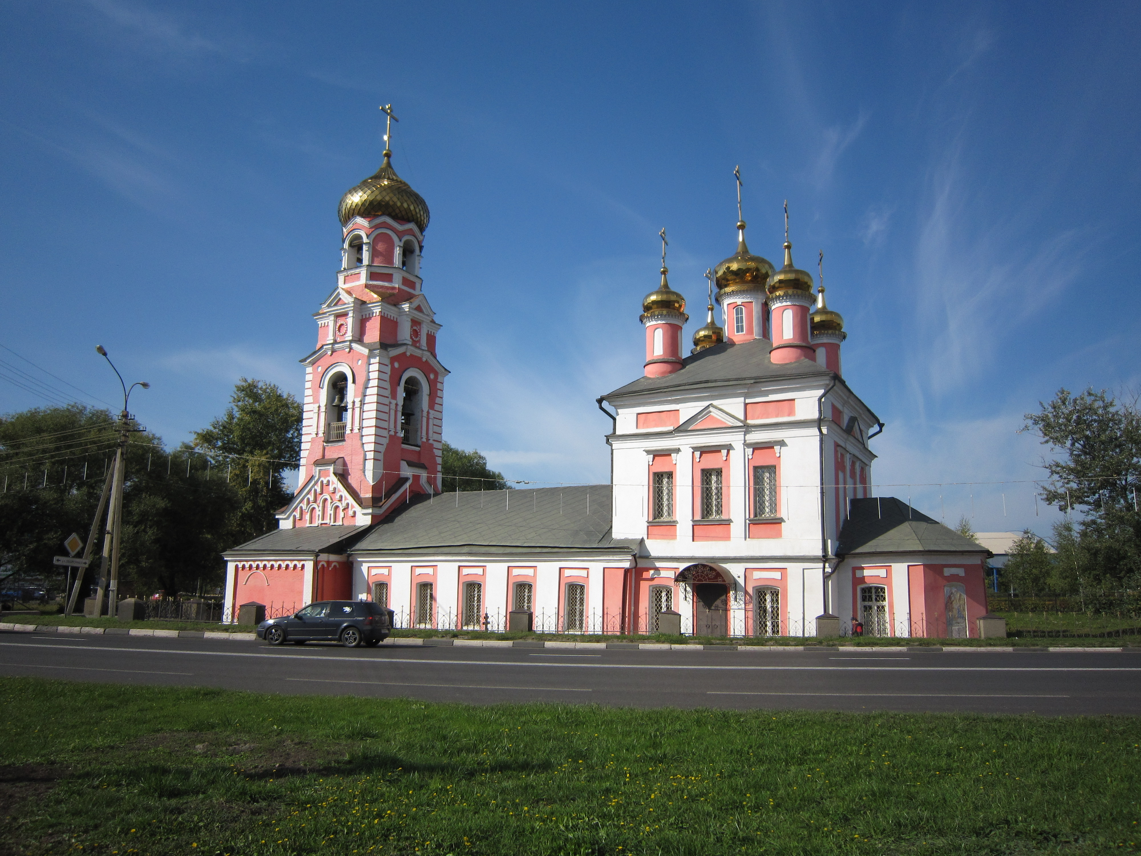 Церковь Сретения Господня (Москва и Московская область, Дмитров, улица Профессиональная, 65)